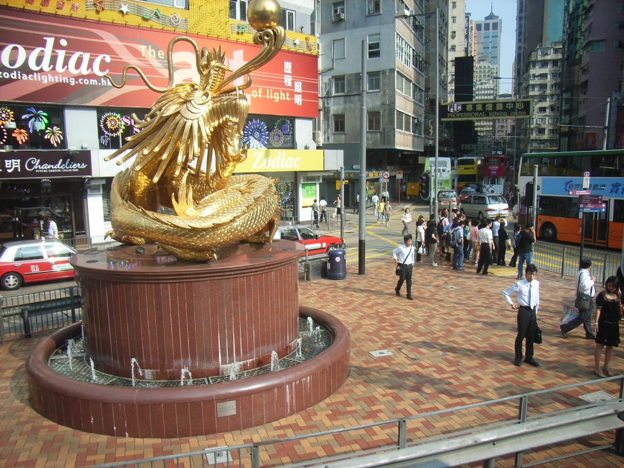 香港zh:灣仔zh:摩理臣山道與zh:堅拿道交界.北望為zh:天樂里 by Morrison TONG.